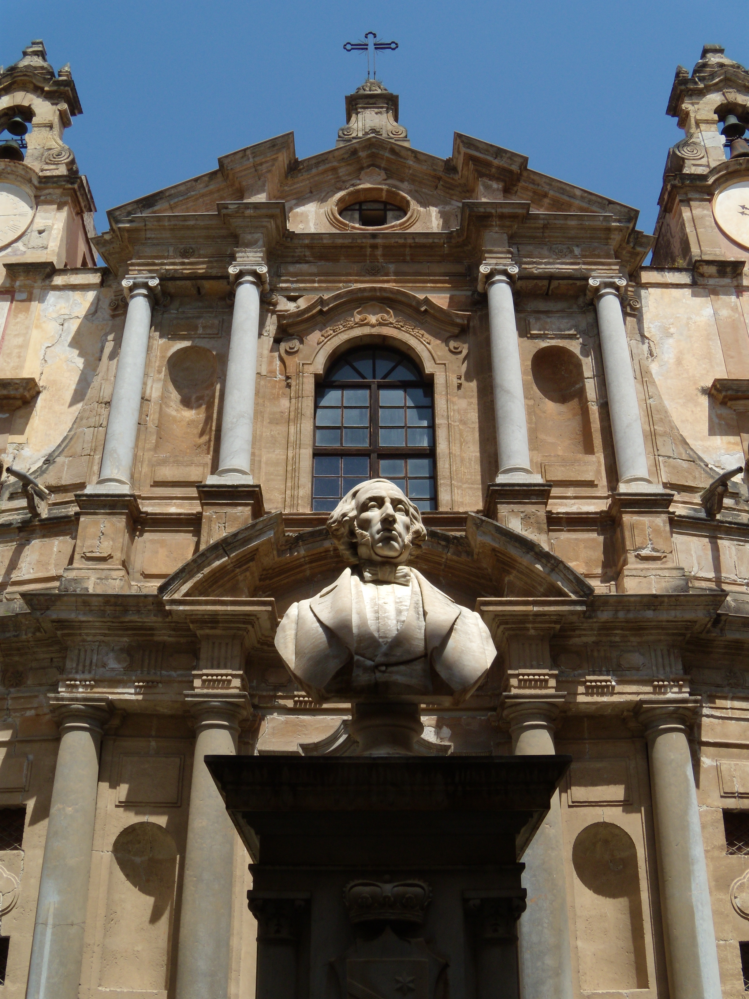 Busto del Principe di Palagonia nel primo cortile dell'Alberto delle Povere (Palermo)